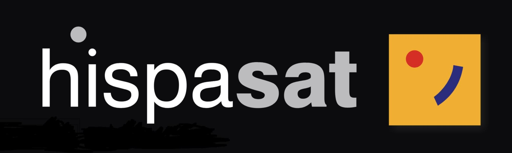 Logo del operador satelital HISPASAT